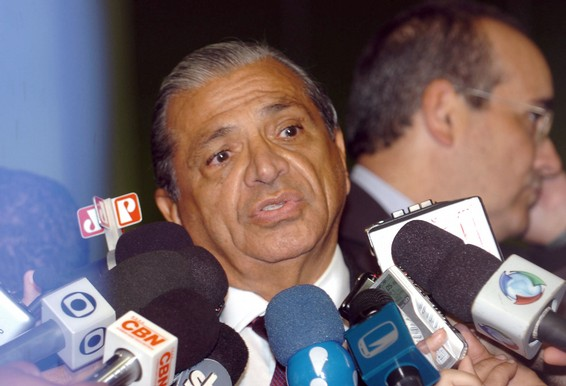 Entrevista do deputado Inocêcio Oliveira (PR-PE), corregedor-geral da Câmara, que apresentou parecer pela cassação do mandato do deputado Paulo Pereira da Silva (PDT-SP).